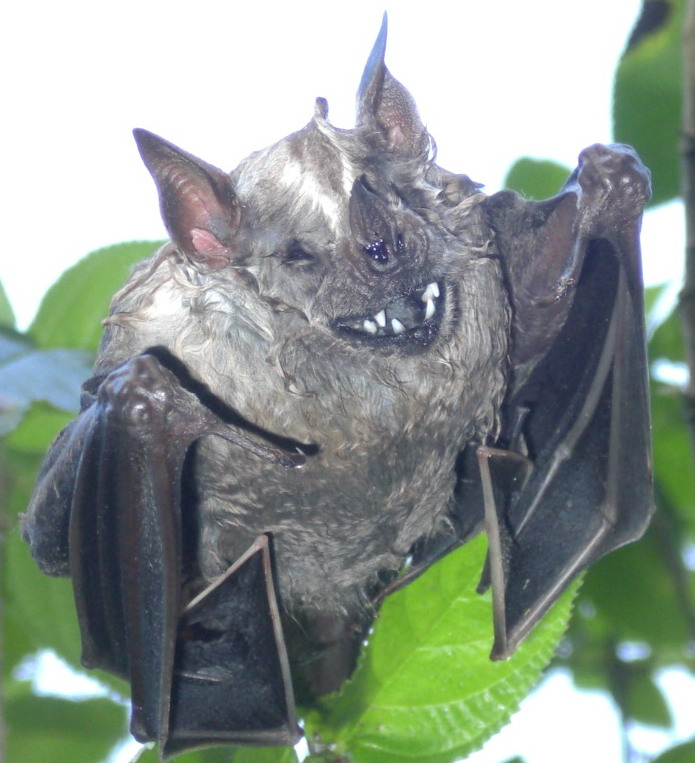 Unbekannte Art der Gattung Amerikanische Haftscheibenfledermäuse